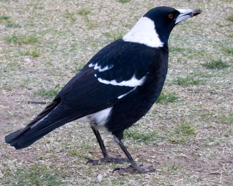 Magpie